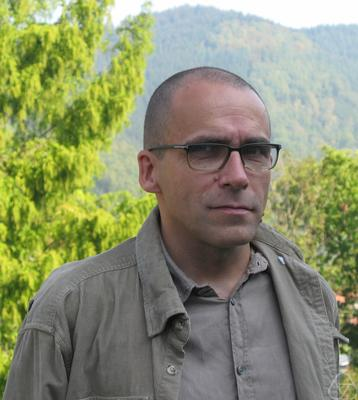 Foto di Daniel Huybrechts